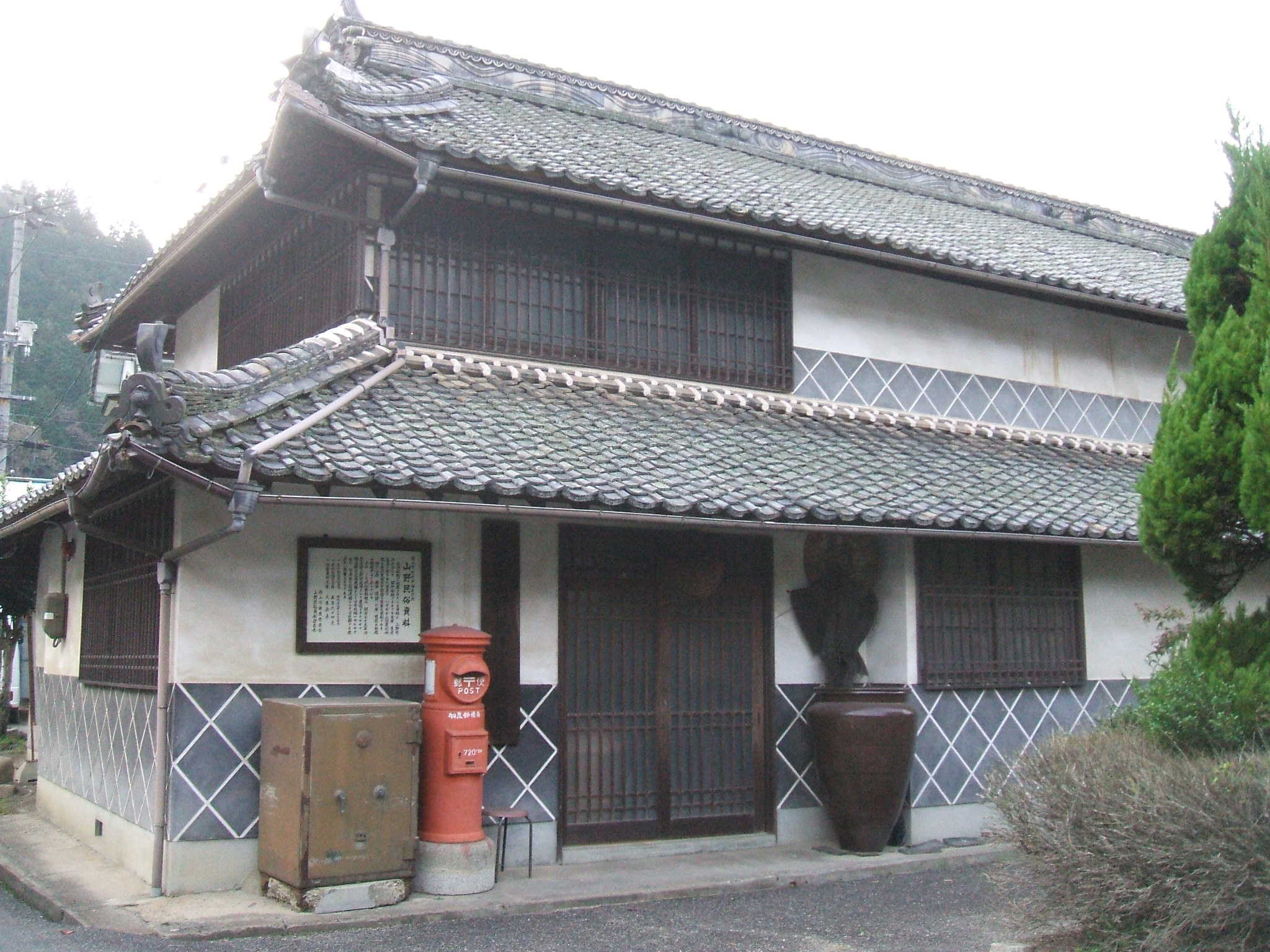 山野民俗資料収蔵庫として保存されている旧山野村役場